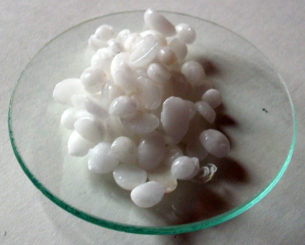 NaOH